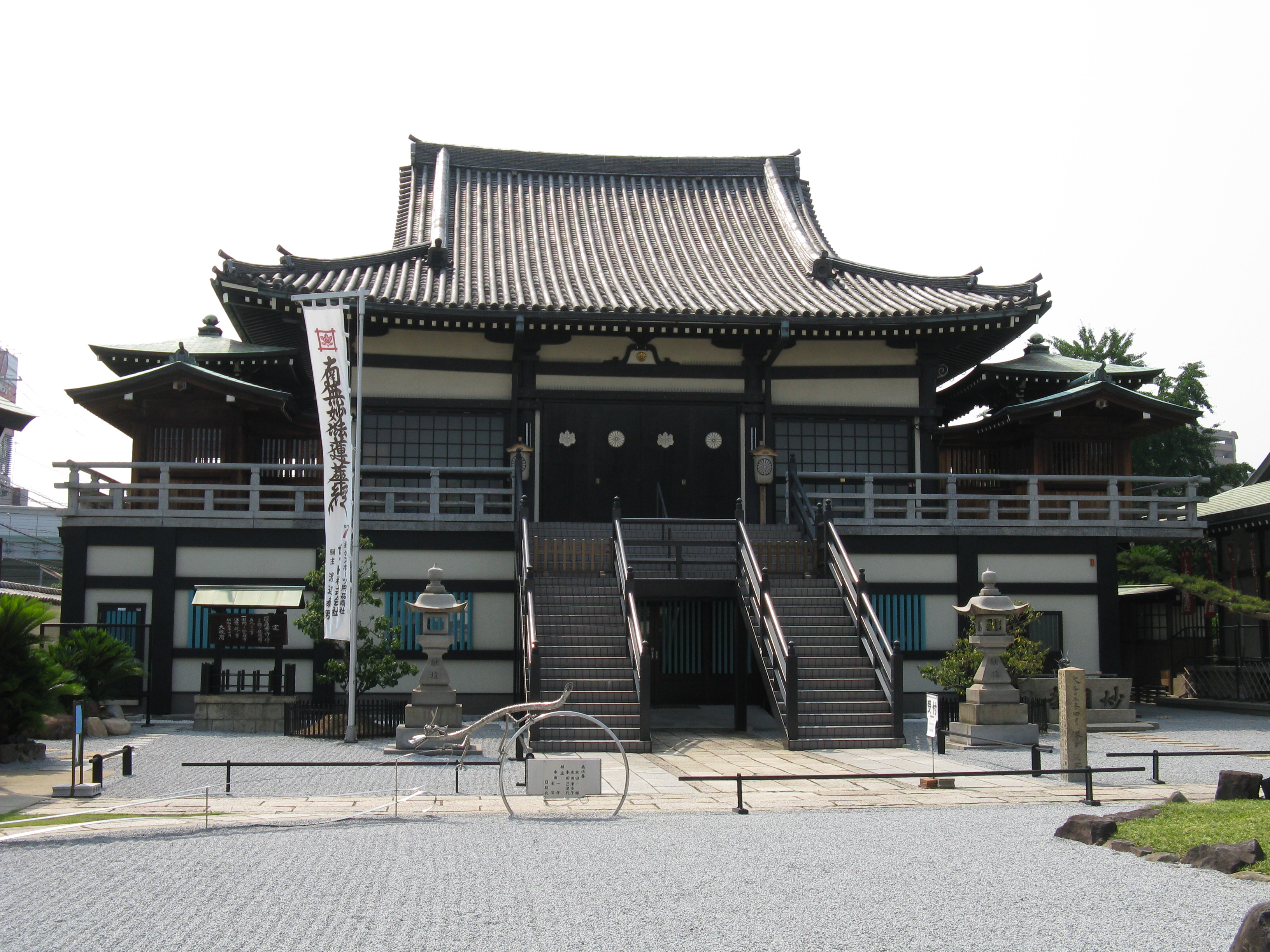 妙國寺 本堂